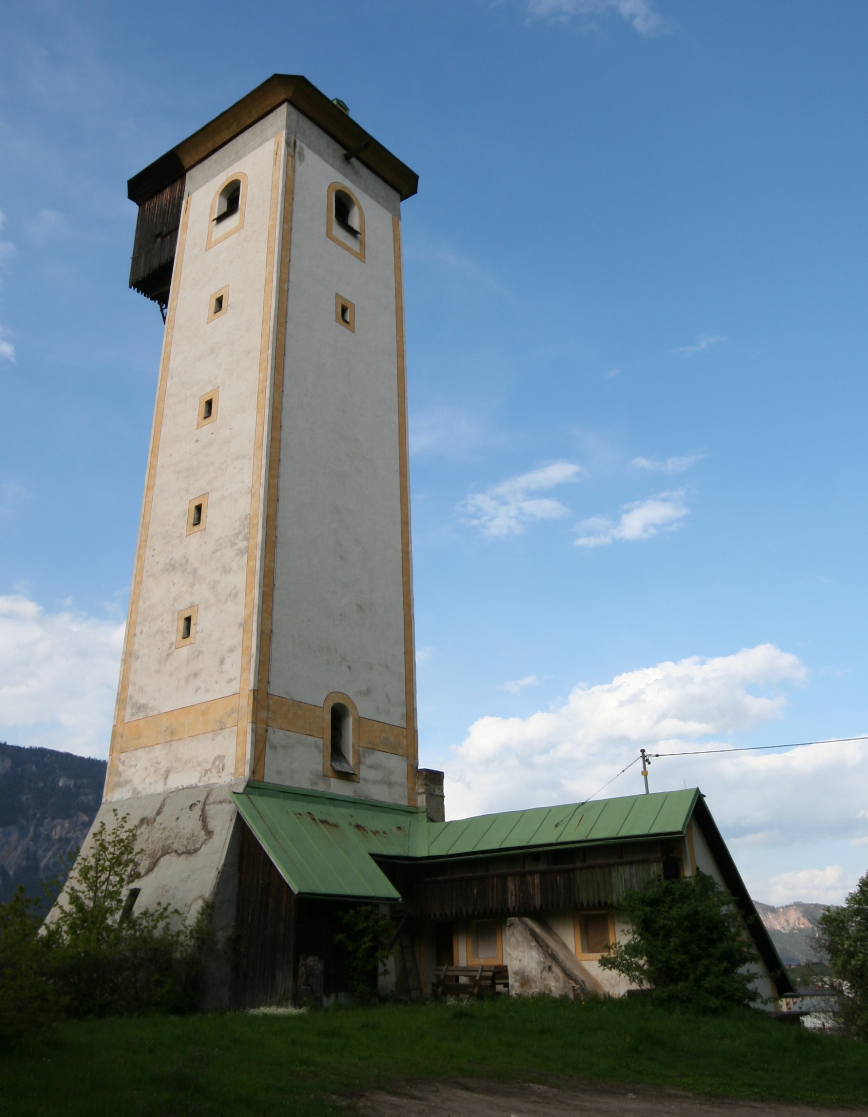 Schrotturm in Arnoldstein. Im Hintergrund der Dobratsch.